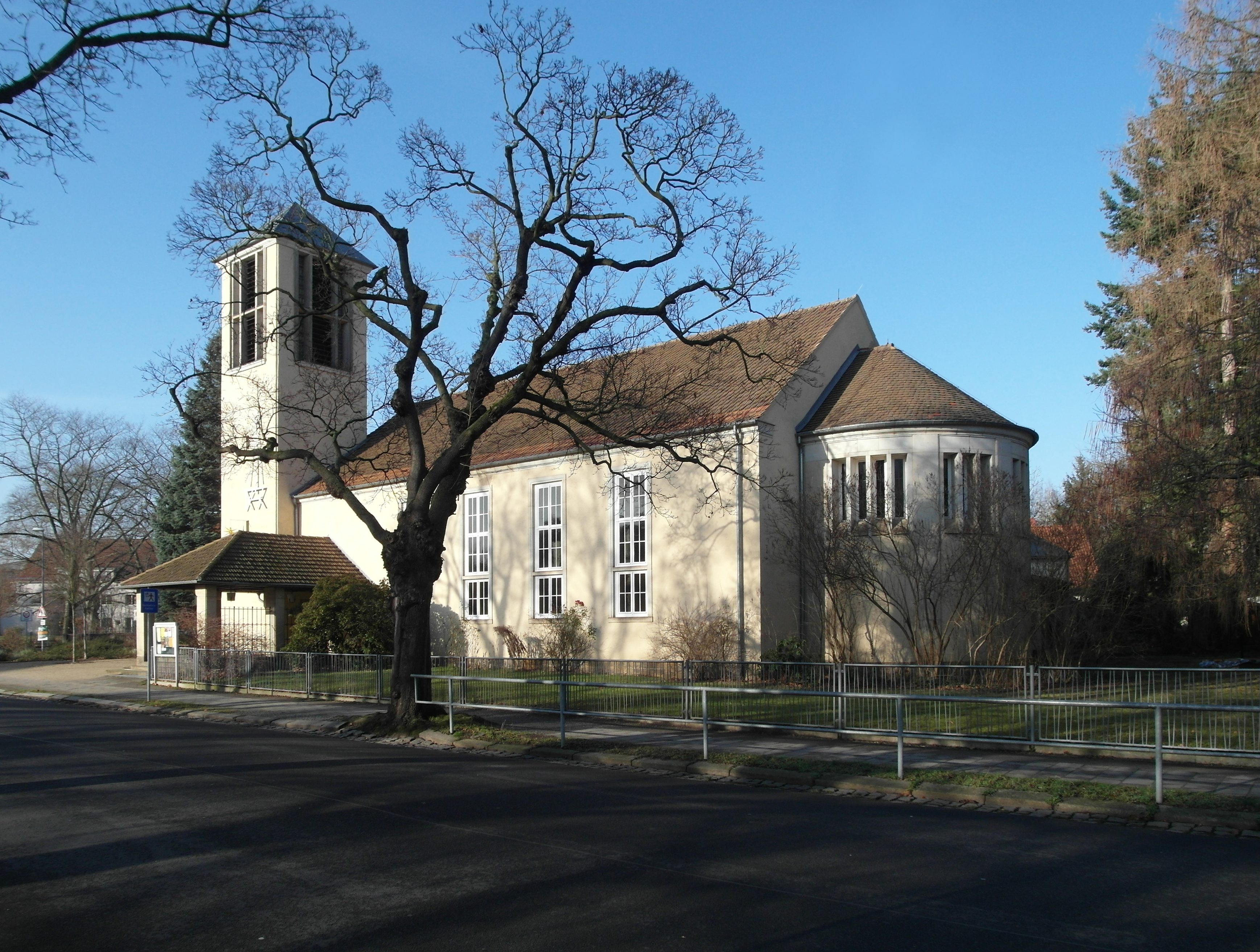 11.01.2018 01705 Dresden-Tolkewitz, Marienberger Straße 65 (GMP: 51.032102,13.822079): Evangelische Bethlehemkirche. Erbaut 1950/51 nach Plänen von Wolfgang Rauda mit einer Orgel der Firma Jehmlich aus Dresden. [SAM3470.JPG]20180111135DR.JPG(c)Blobelt